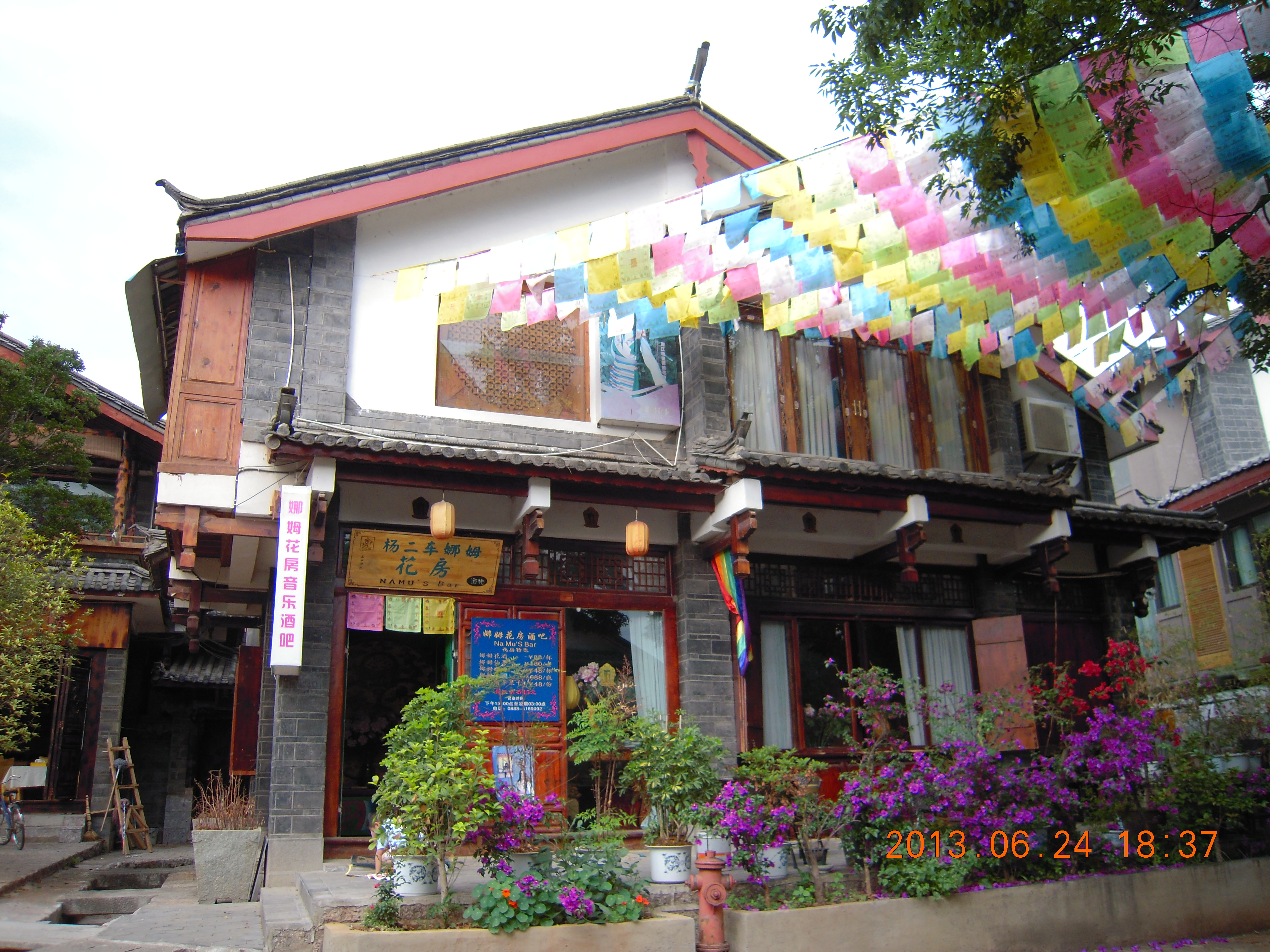 中文（中国大陆）: 杨二车娜姆酒吧，位于云南省丽江市